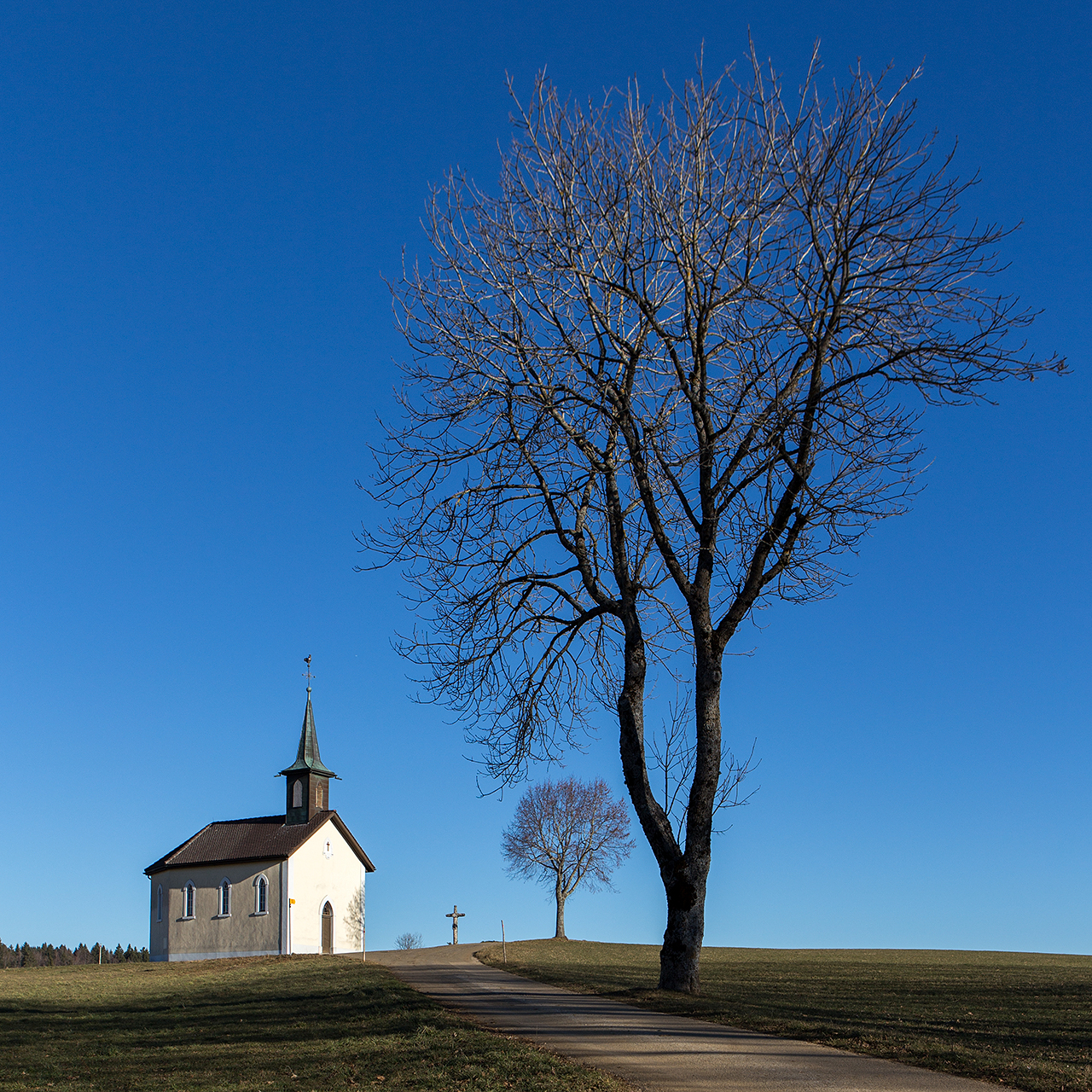 Chapelle Notre Dame de Lourdes im Weiler La Bosse bei Le Bémont (JU)